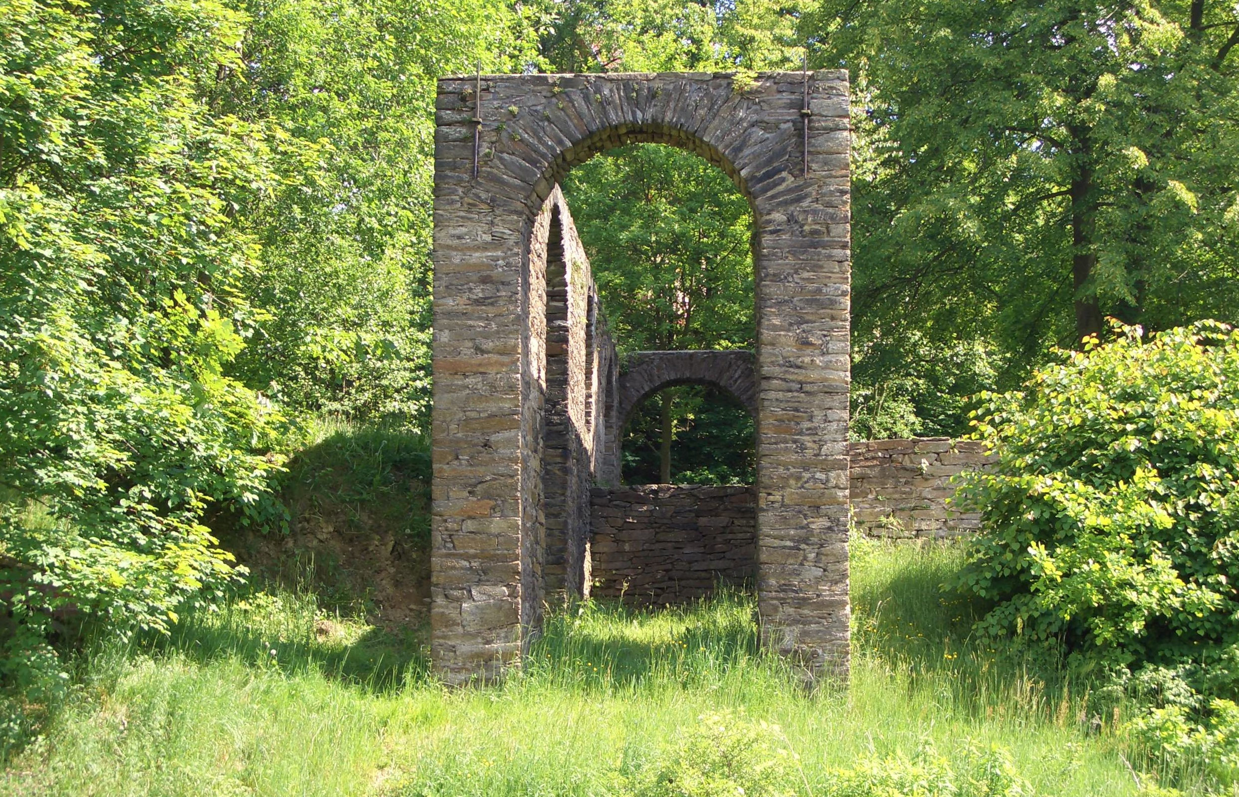 Das Kahnhebehaus Halsbrücke, Landkreis Mittelsachsen, Sachsen, Deutschland.